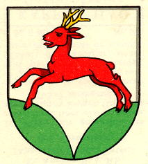 Wappen von Rehtobel Kanton Appenzell Ausserrhoden Schweiz